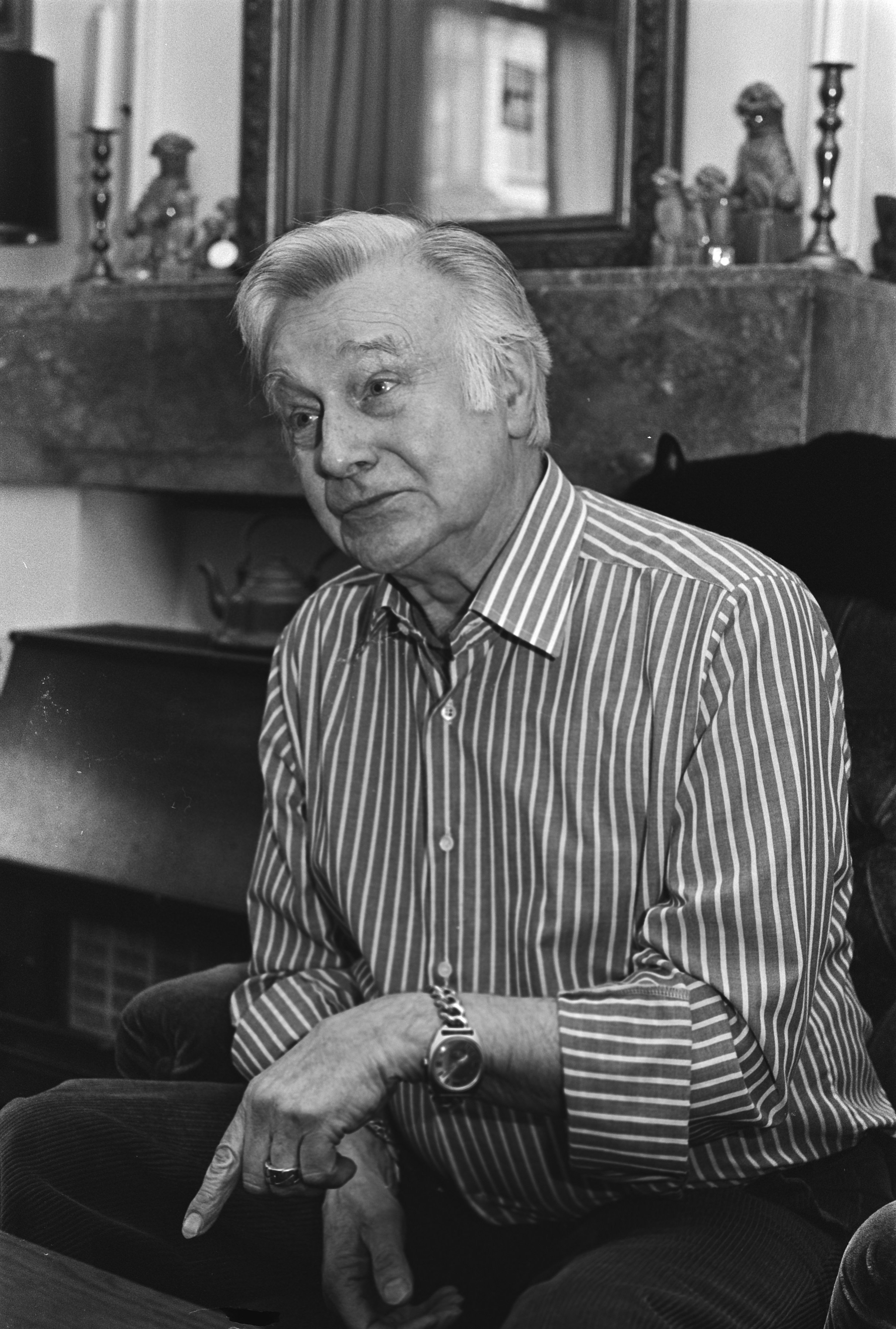 Collectie / Archief : Fotocollectie Anefo Reportage / Serie : [ onbekend ] Beschrijving : Opdracht Tubantia, Ben Aerden , regisseur en toneelspeler Datum : 6 maart 1981 Trefwoorden : Regisseurs, toneelspelers Instellingsnaam : Tubantia Fotograaf : Antonisse, Marcel / Anefo Auteursrechthebbende : Nationaal Archief Materiaalsoort : Negatief (zwart/wit) Nummer archiefinventaris : bekijk toegang 2.24.01.05 Bestanddeelnummer : 931-3604